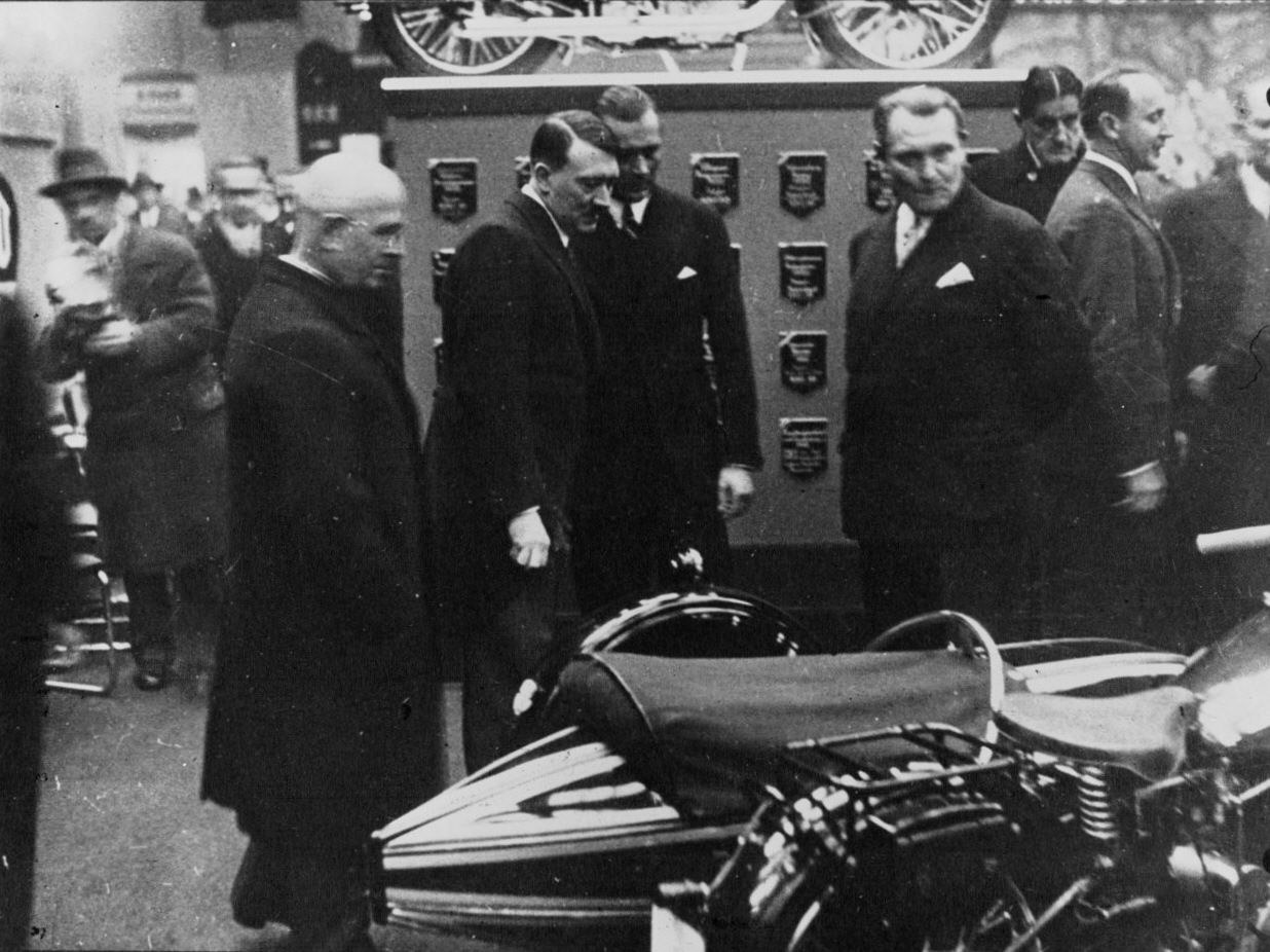 Adolfo Hitler y Goering visitando el salón del automóvil de Berlín en 1933.